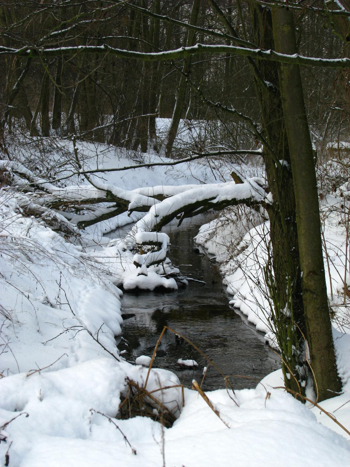 Okolice Wojcieszyc